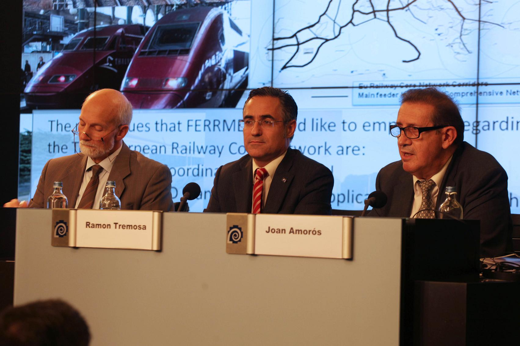 Ramon Tremosa a l'acte a favor del corredor mediterrani, a Brussel·les 21-09-2011, també hi ha en Joan Amorós.